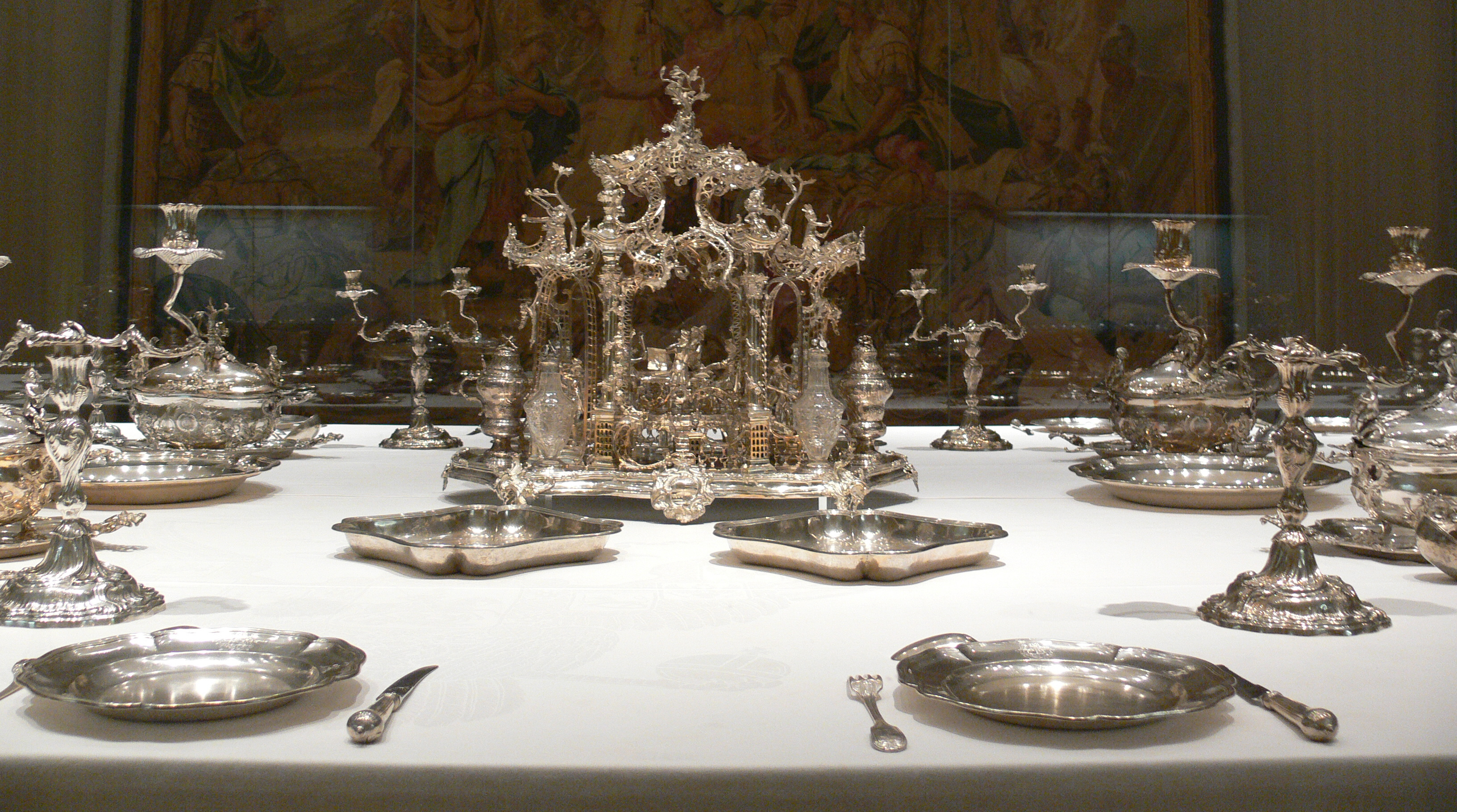 Das Augsburger Tafelservice der Fürstbischöfe von Hildesheim (das weitaus vollständigste der erhaltenen deutschen Silberservice des 18. Jahrhunderts), geliefert 1763 an Bischof Friedrich Wilhelm von Westphalen Bayerisches Nationalmuseum, München